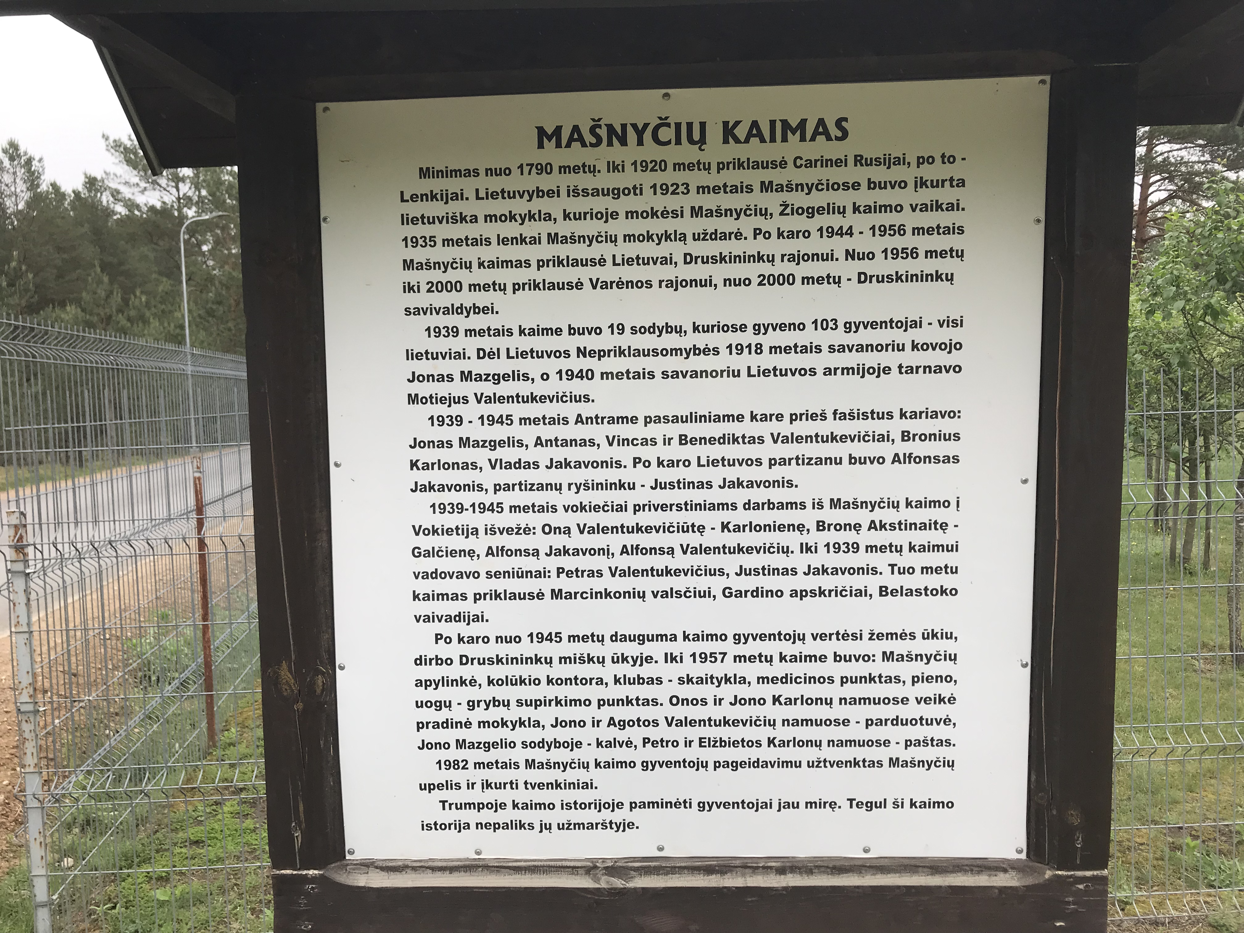 Paneel is vastgelegd tijdens een wandelproject Amsterdam-Moskou